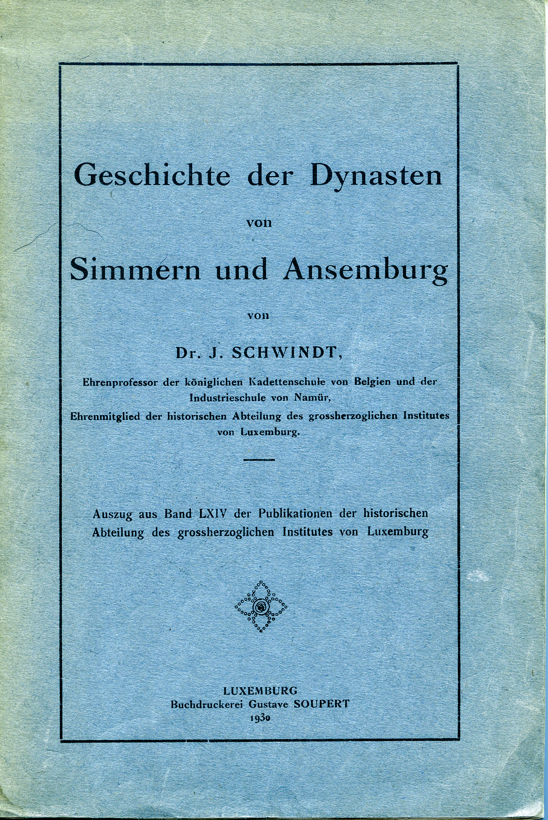 Jean Schwindt: Geschichte der Dynasten von Simmern und Ansemburg.